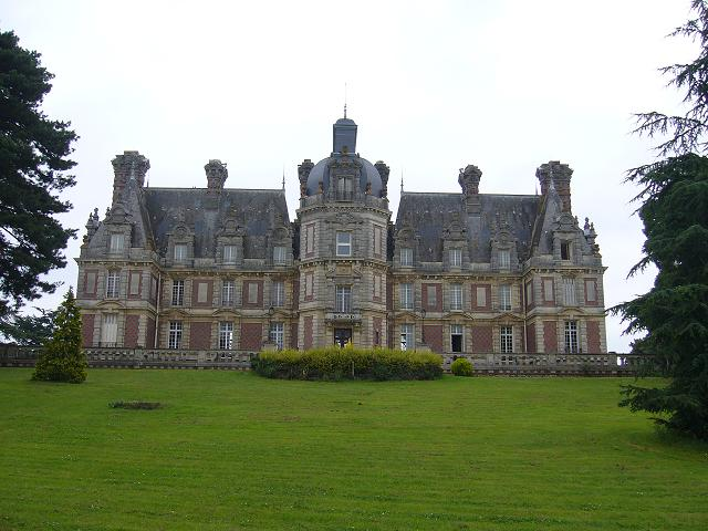 La façade arrière du château du XIXe siècle de La Turmelière.